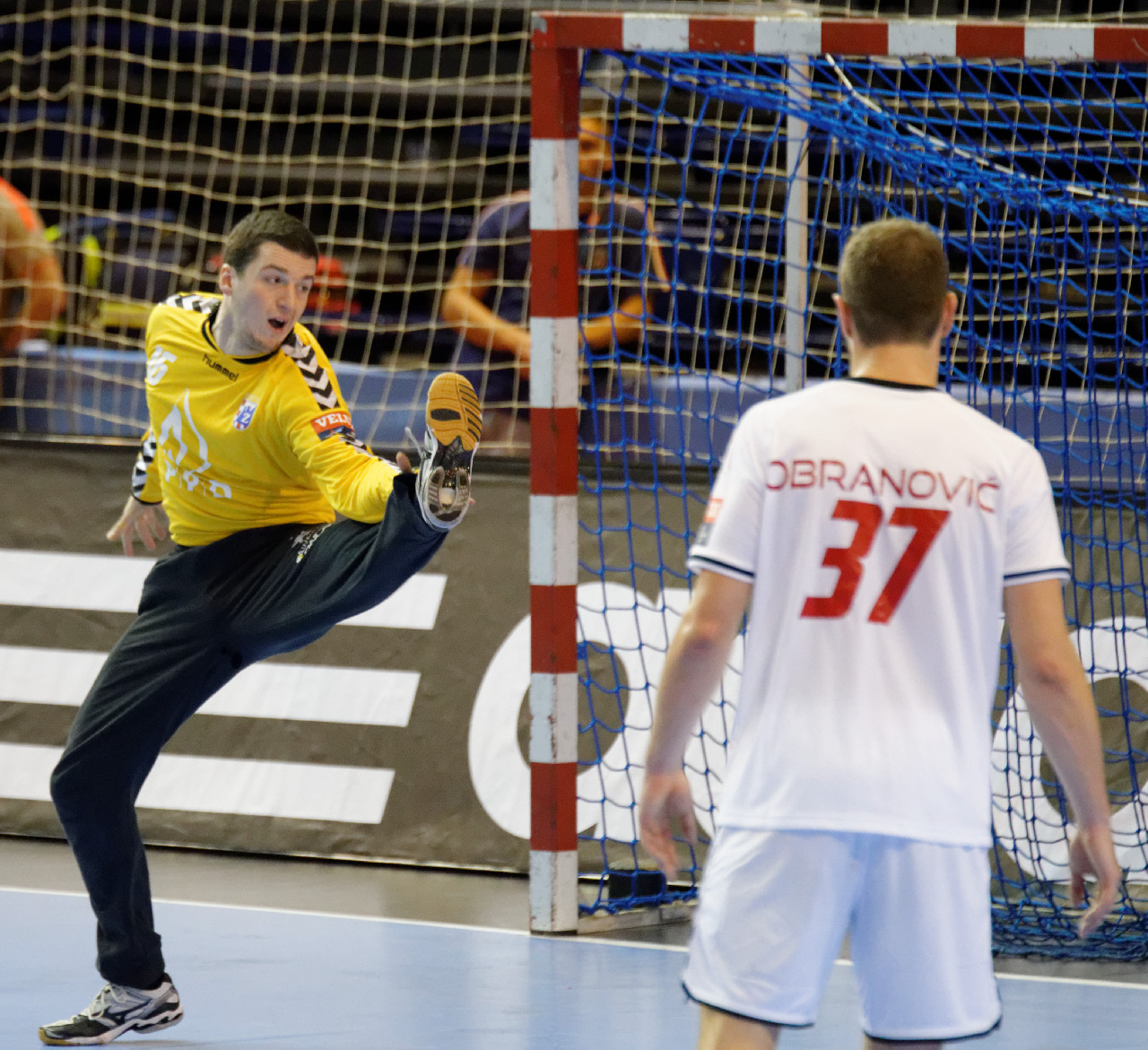 Rencontre de phase de groupe de la ligue des champions 2015-16 entre le PSG et le RK Zagreb. A la Halle Carpentier (Paris), le 11 ocotbre 2015.